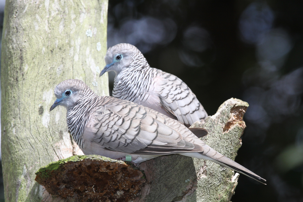 Peaceful Dove - Geopelia placida